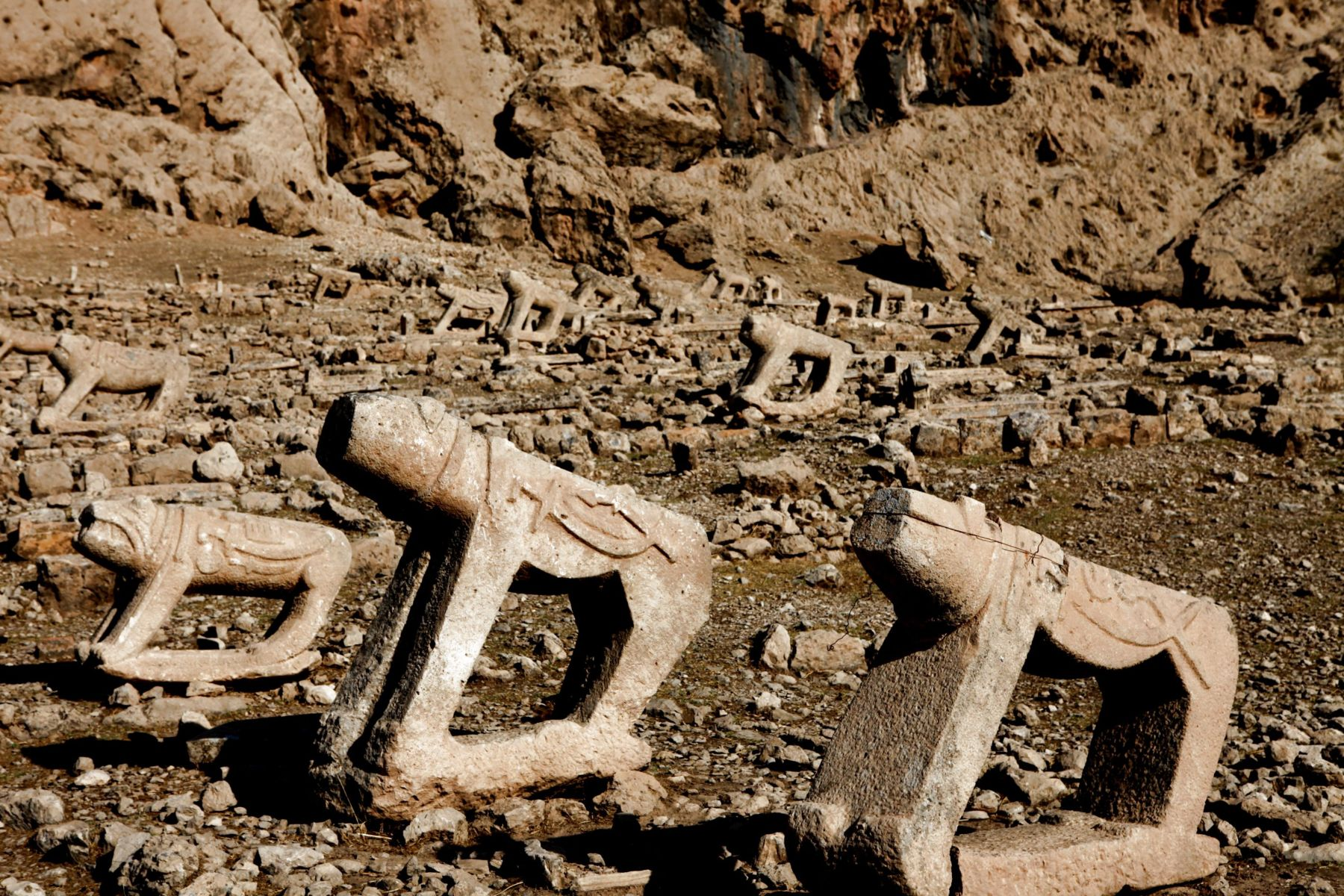 Bakhtiari cemetery, Izeh, Khuzestan, Iran